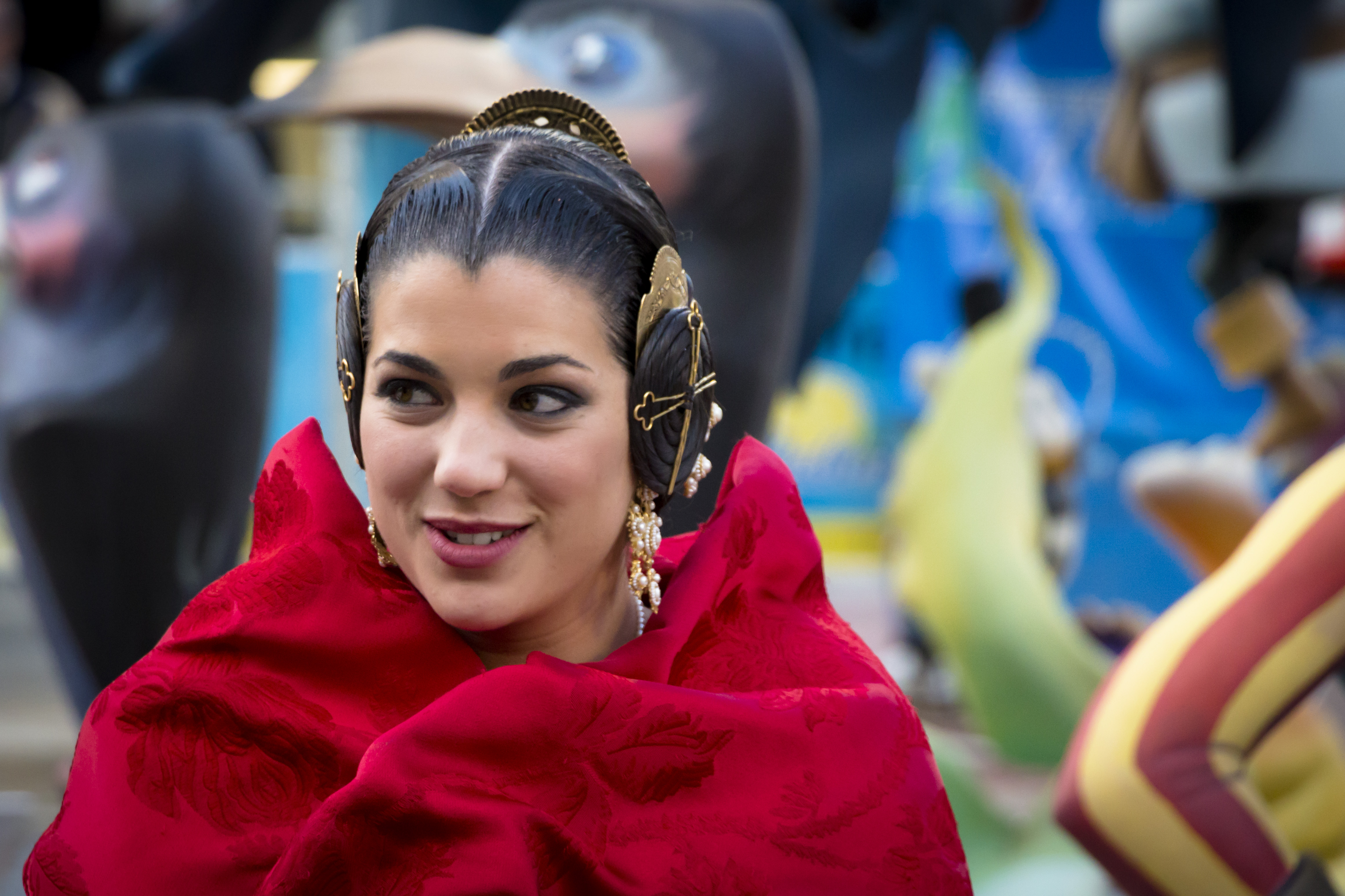 Estefanía López Montesinos, Fallera Mayor de Valencia 2015, visitando la falla de L'Antiga de Campanar en una fría tarde de marzo, cubriendo su traje tradicional con un manto para abrigarse. This is a photography of a Folklore festival in Spain (Wikidata id Q1143768).